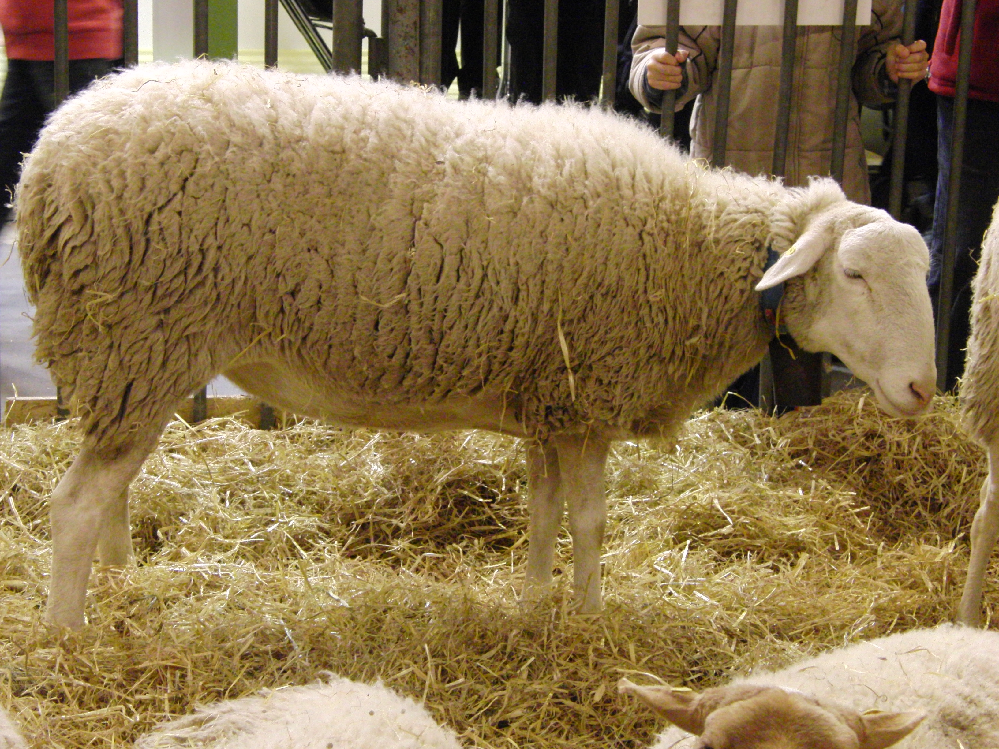 Brebis Caussenarde des Garrigues - Salon international de l'agriculture 2013, Paris, France